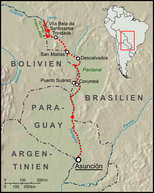 Route und Stationen der Rio Verde Expedition des Percy Fawcett